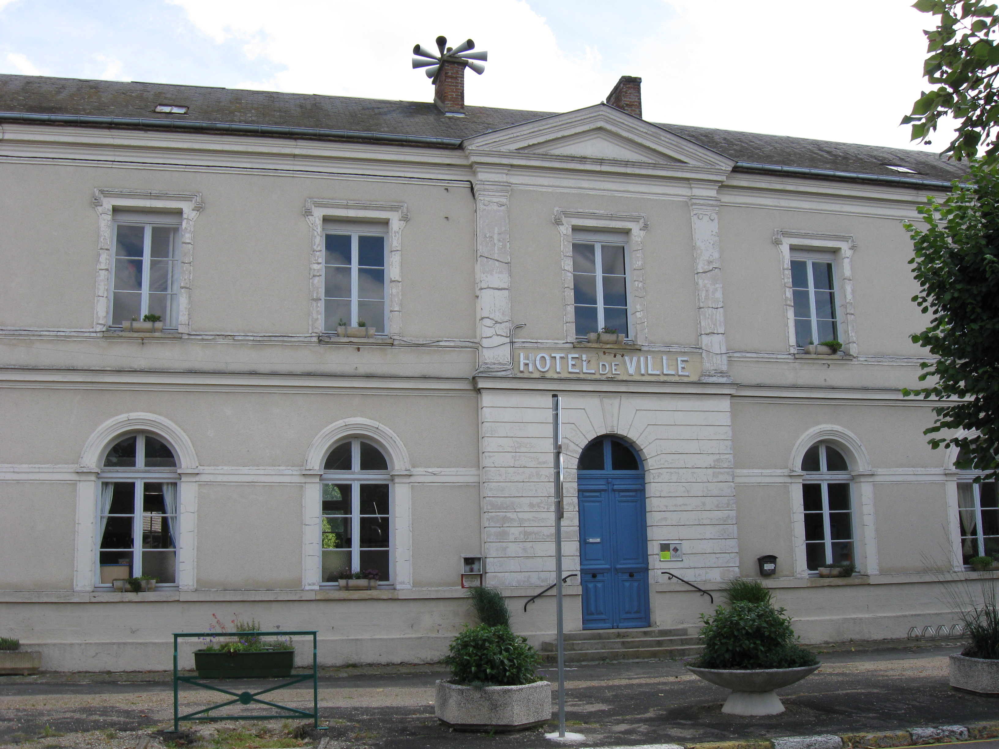 La mairie de Beaumont-du-Gâtinais. (département de la Seine-et-Marne, région Île-de-France).